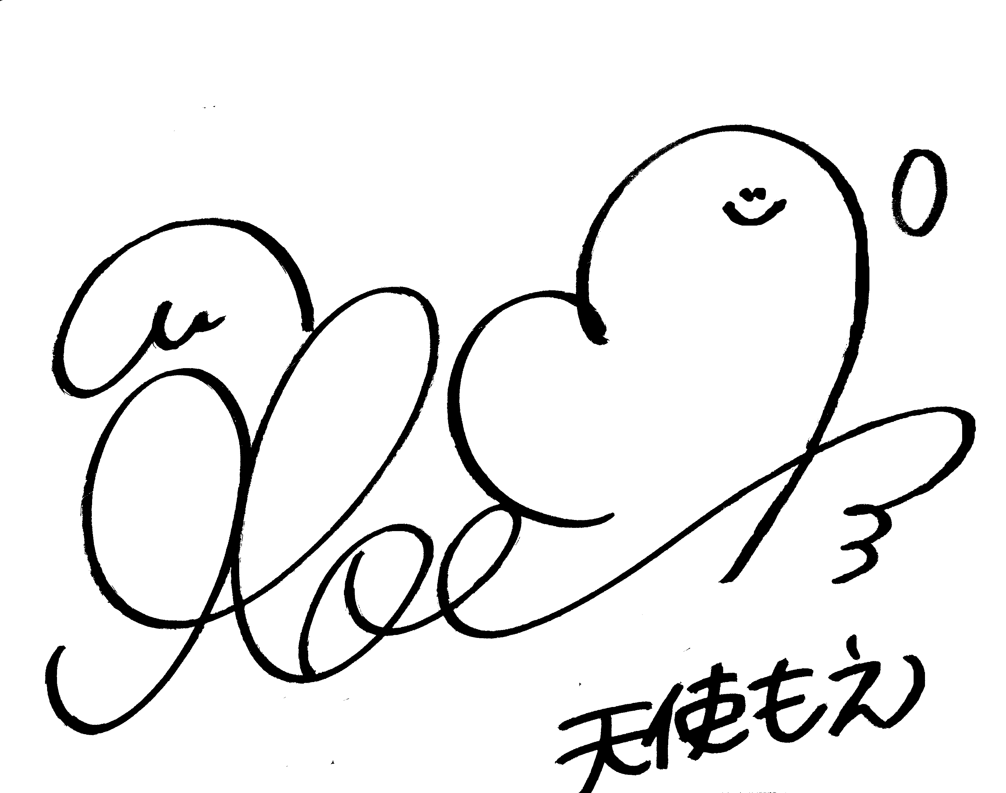 天使もえ署名